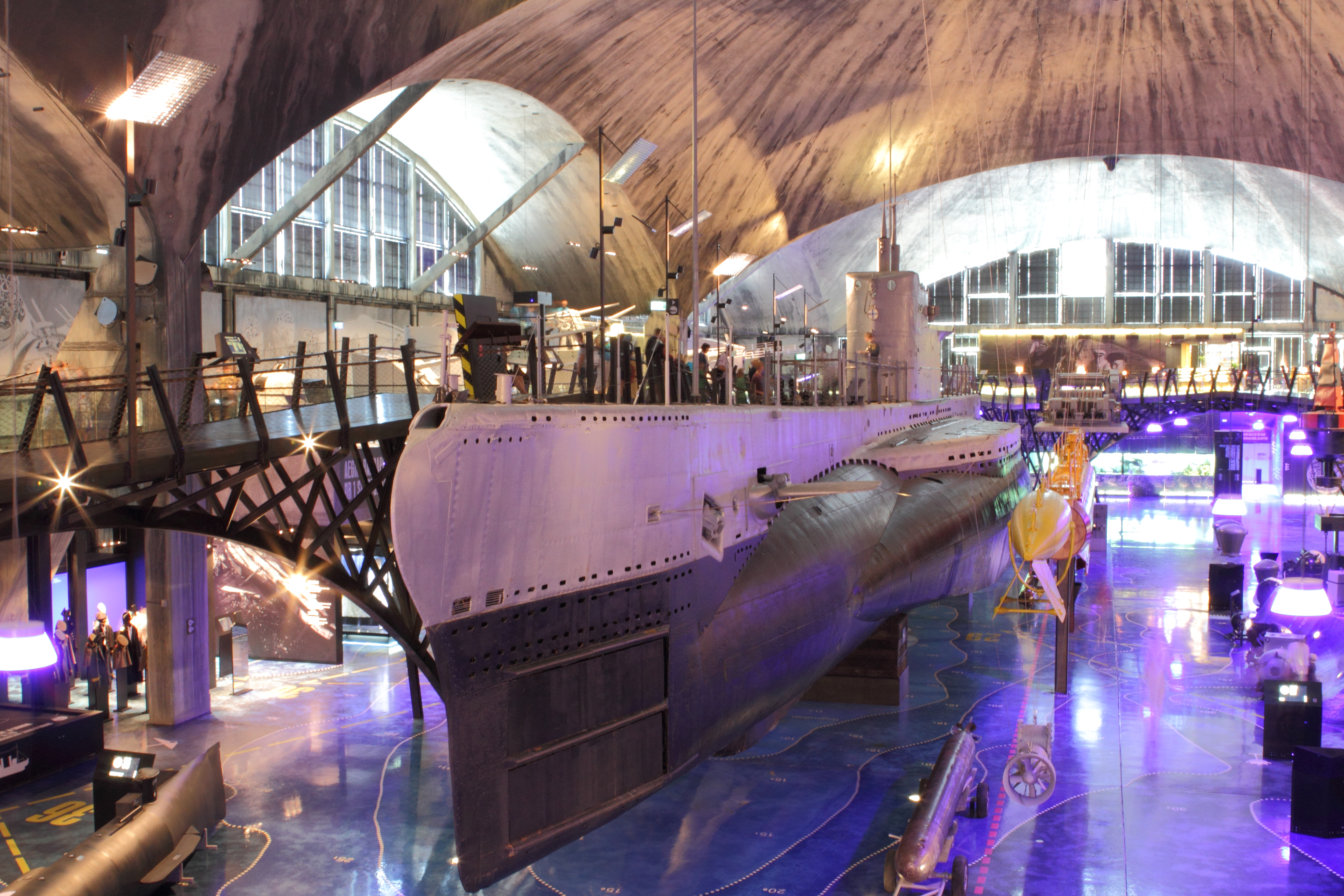 Renoveeritud Tallinna vesilennukite angaarid, allveelaev Lembit ja Eesti Meremuuseumi ekspositsioon.